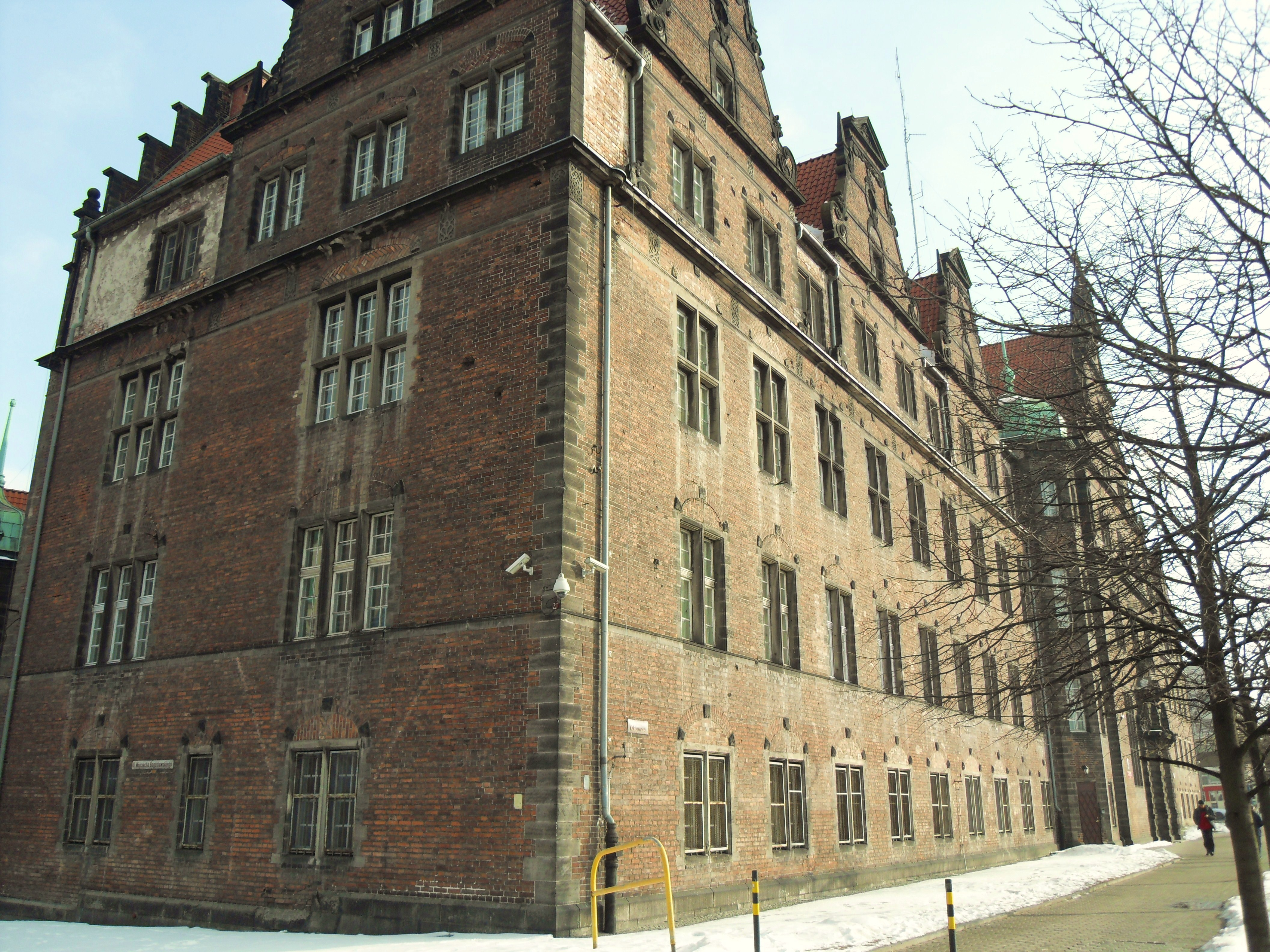 Zabytkowy budynek przy ul. Okopowej 9 w Gdańsku, zbudowany w latach 1902-1905 jako Królewskie Prezydium Policji. Później znany jako Prezydium Policji.